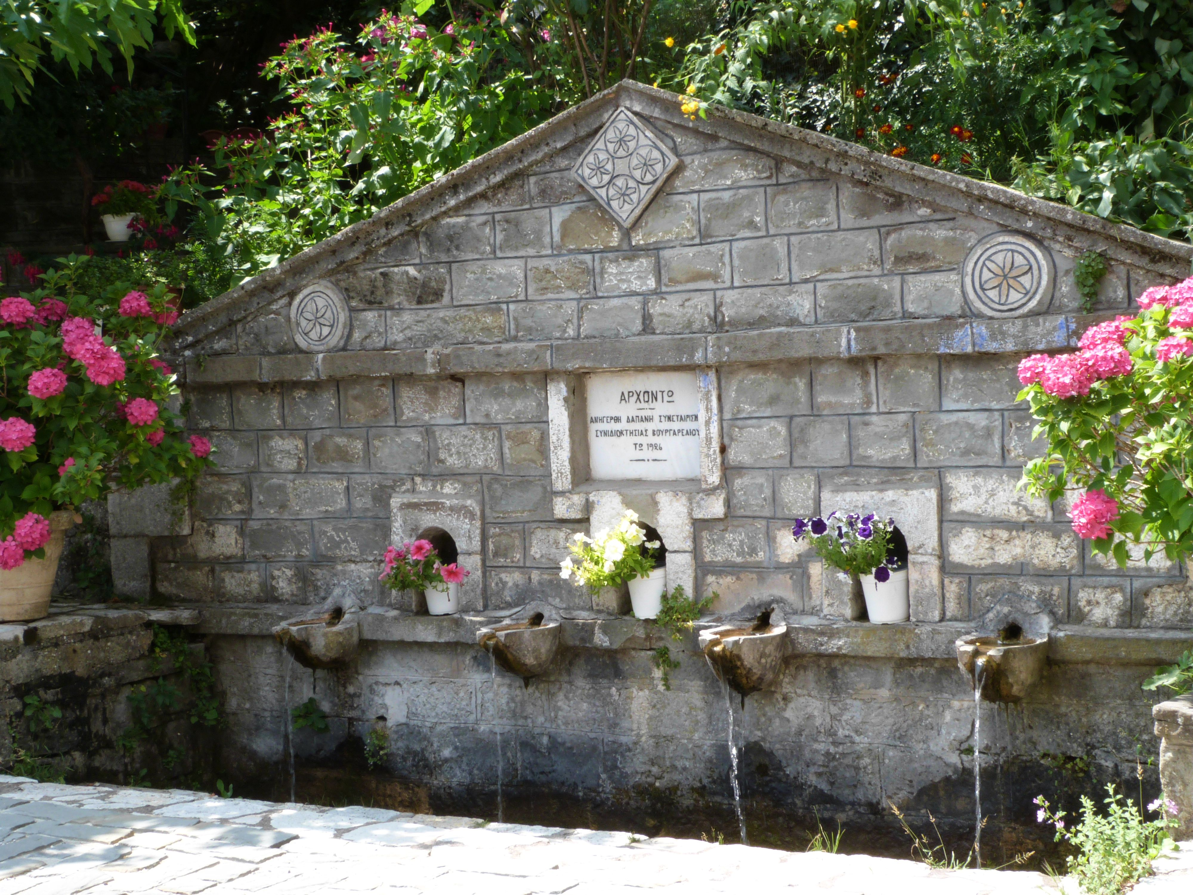 typischer Brunnen in Epirus